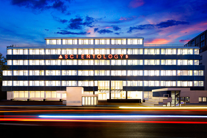 Foto van het nieuwe gebouw van Scientology Wibautstraat